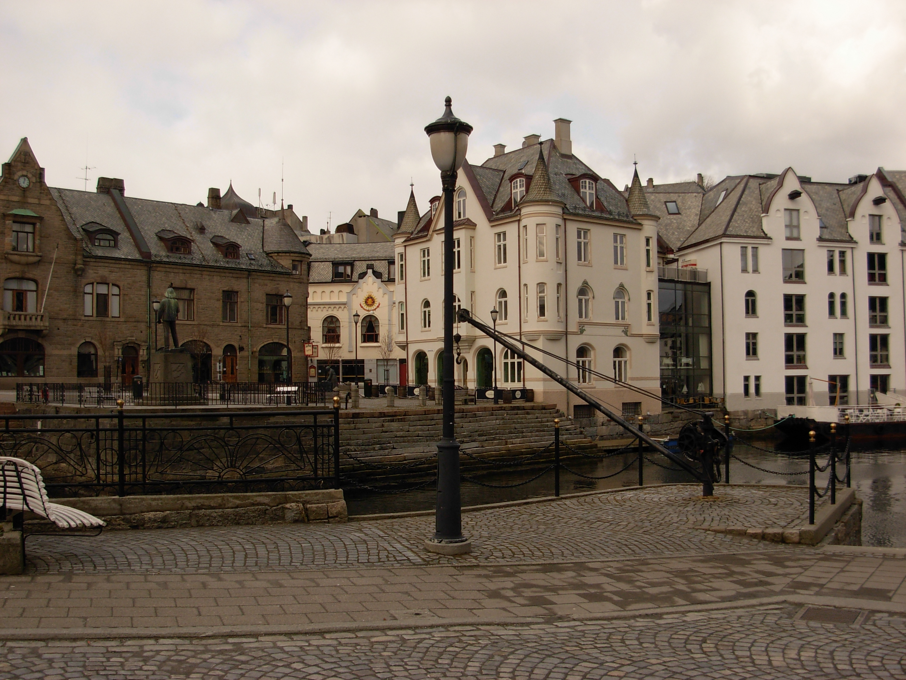 Alesund